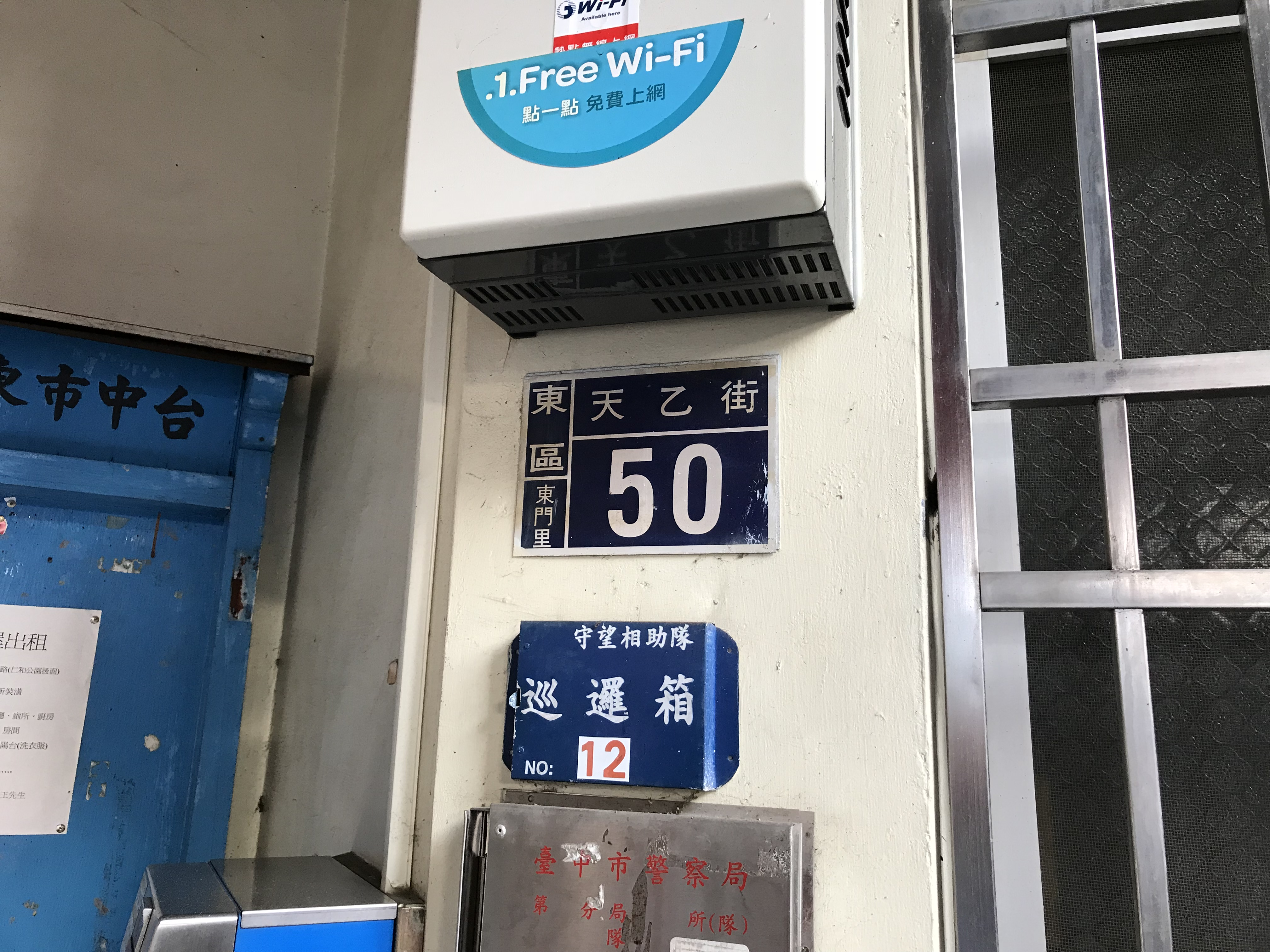 中文（台灣）: 天乙宮門牌